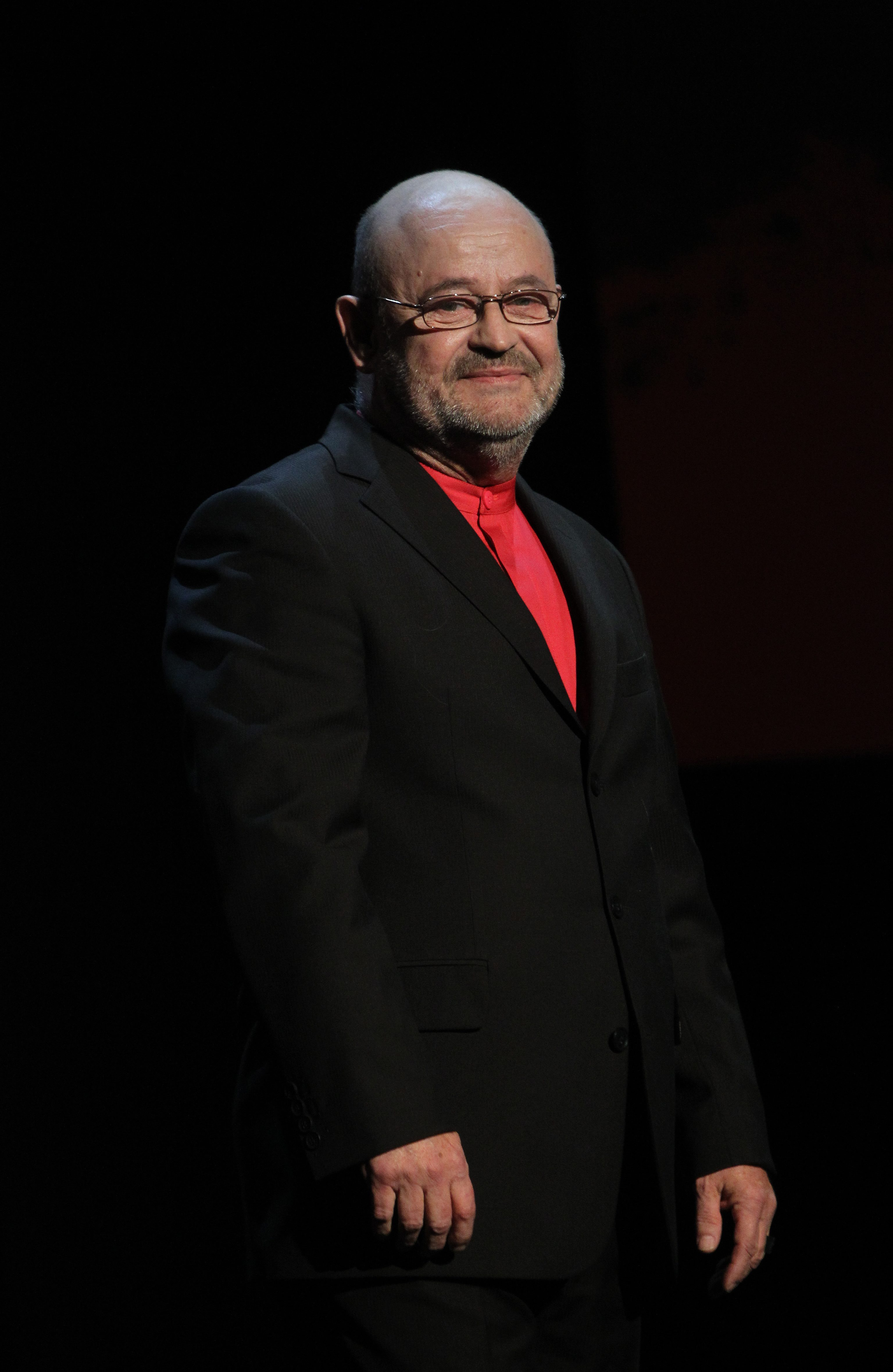 Vlado Novak.